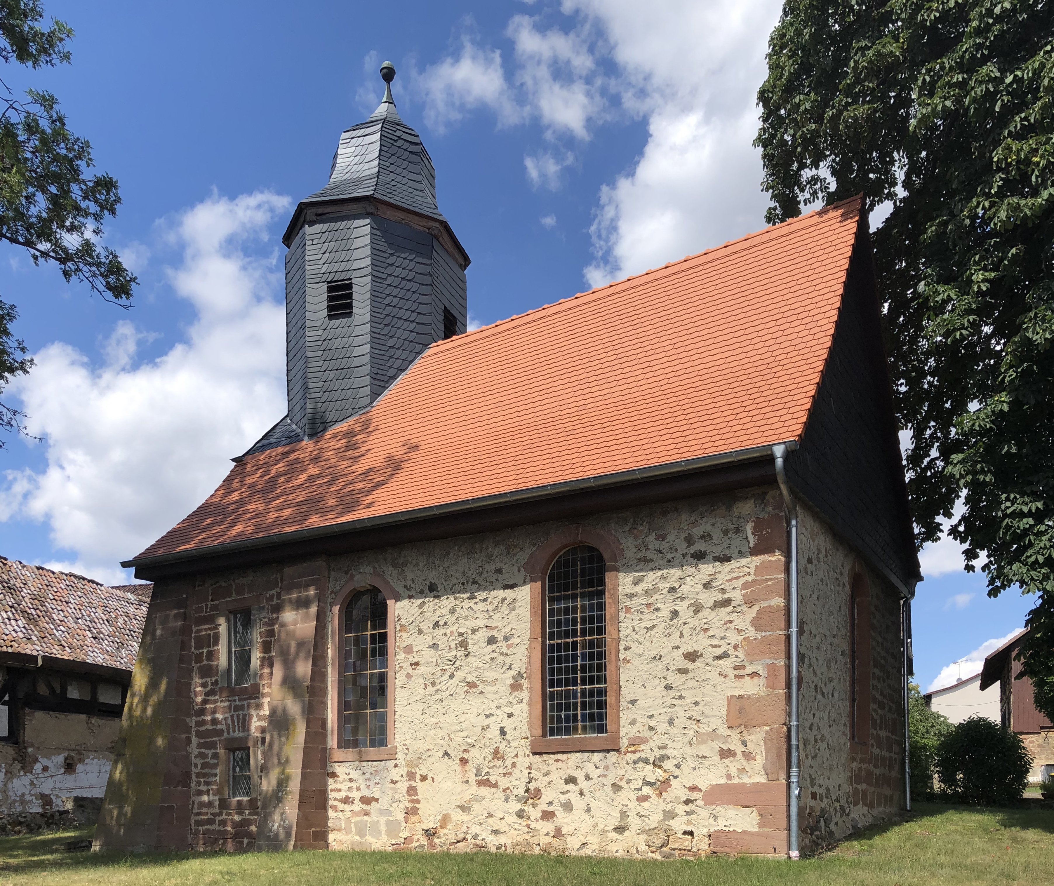 Kirchengebäude